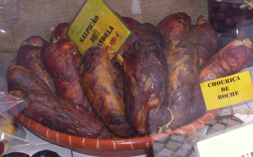 Salpicão, a portuguese sausage